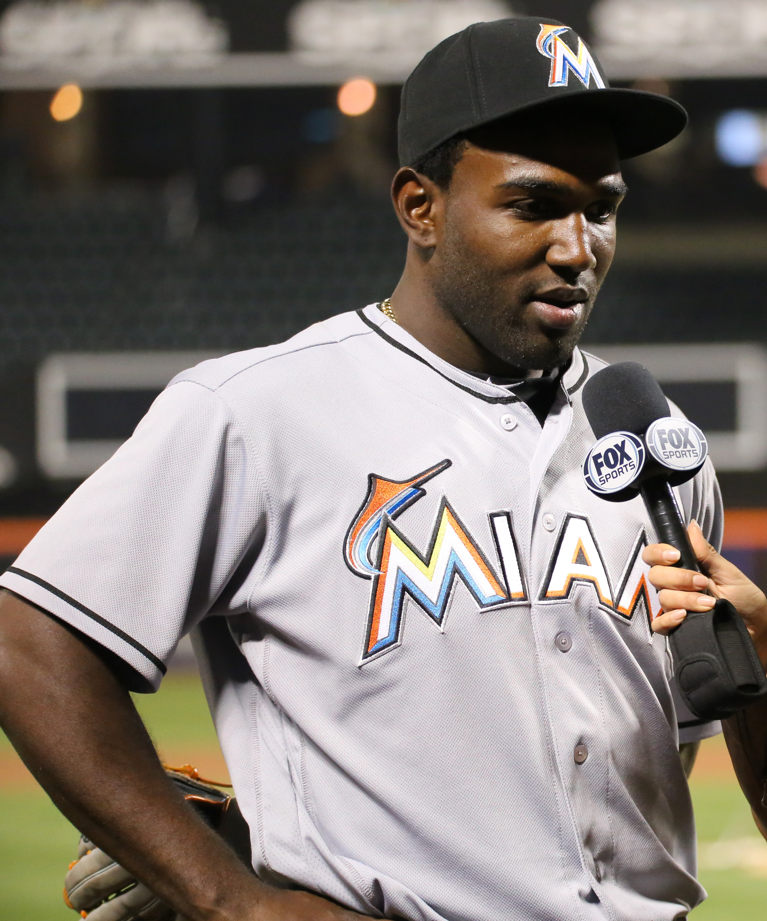 Marcell Ozuna